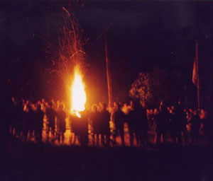 Bauhüttenfest auf der Jugenburg Streitwiesen